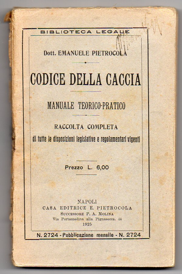 1925, Biblioteca Legale n.2724